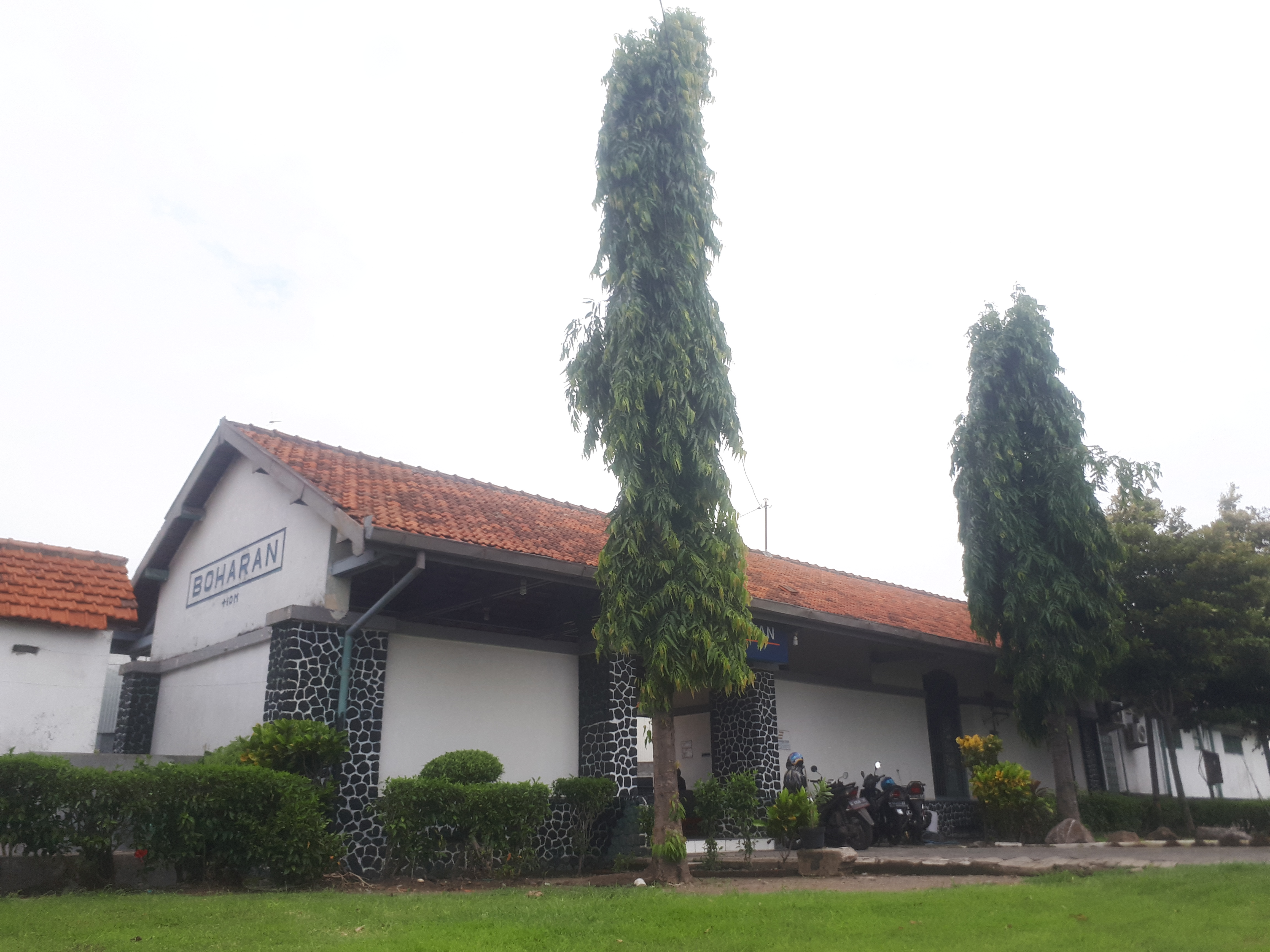 Tampak luar Stasiun Boharan tahun 2020